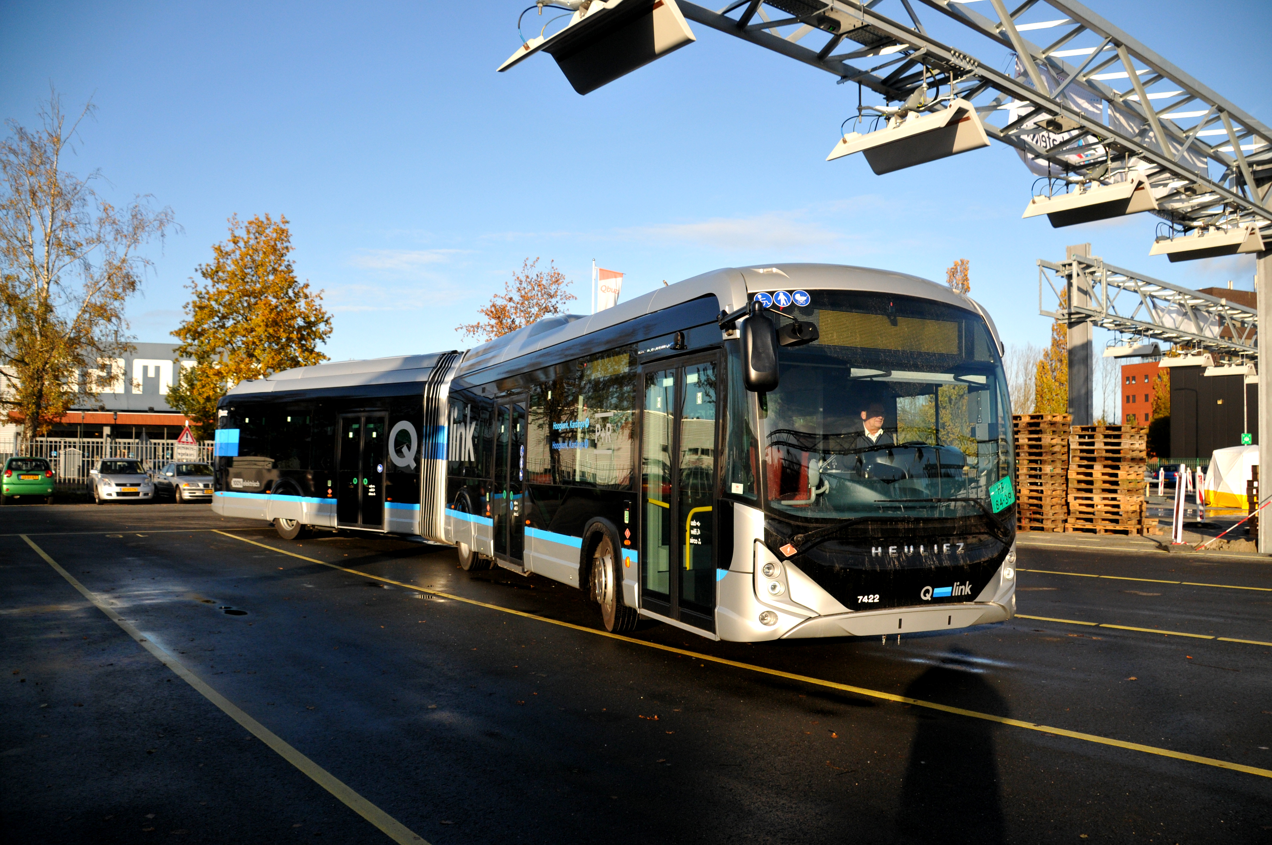 Qbuzz elektrische bus 7422 van het type Heuliez GX 437 Linium ELEC bij een tussenstop aan de Peizerweg te Groningen. Hierna vertrok de bus naar Veendam voor een afleveringsinspektie bij Garage Cornelis.